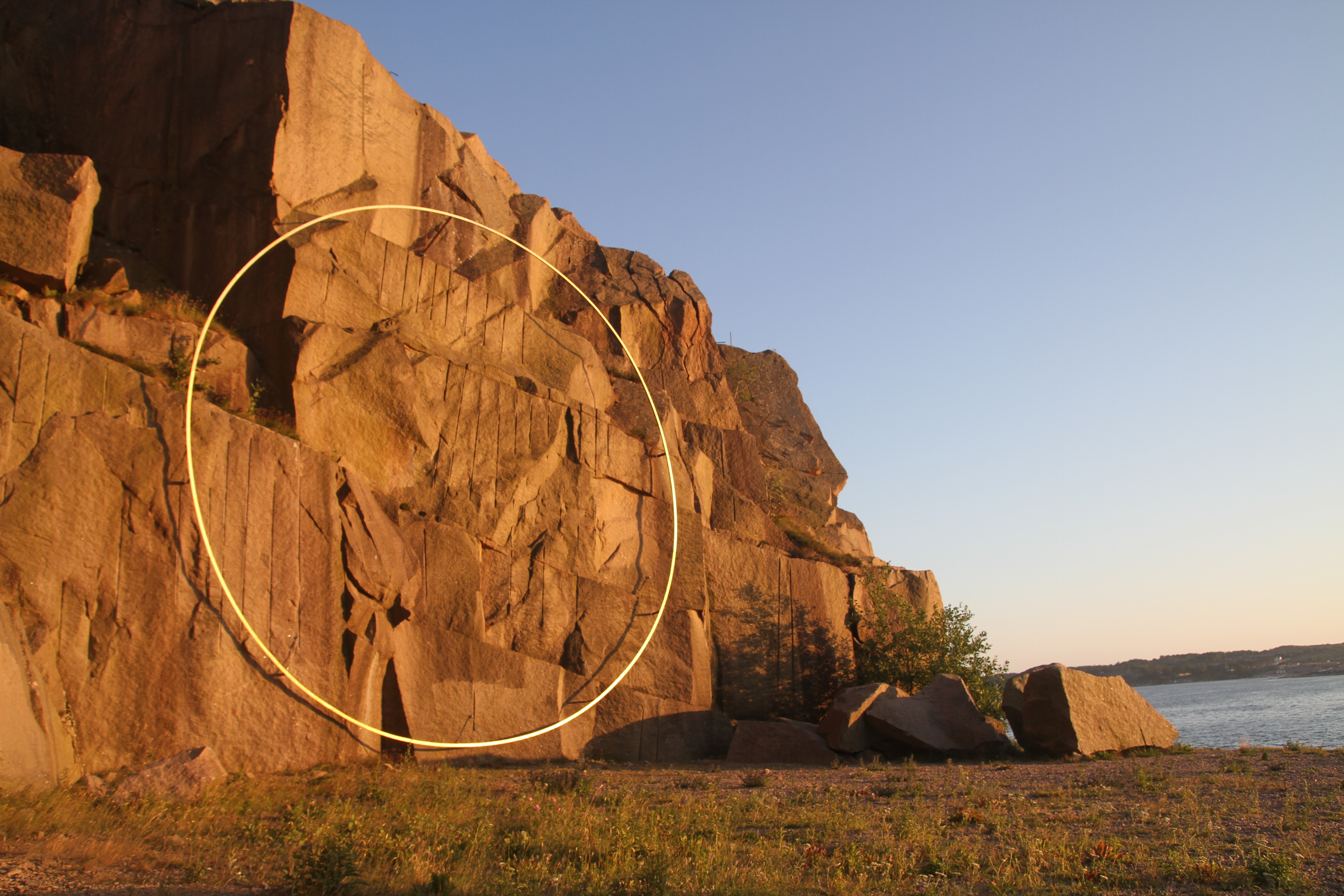 Uddens skulpturpark 2018.